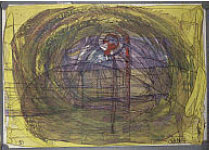 Stadt der schwarzen Sonne